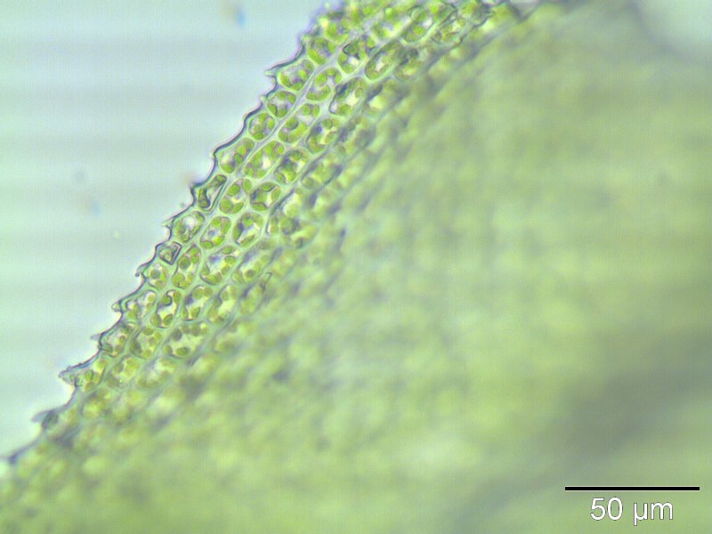 Tamariskenblättriges Thujamoos (Thuidium tamariscinum), Blattrand, 400-fache Vergrößerung